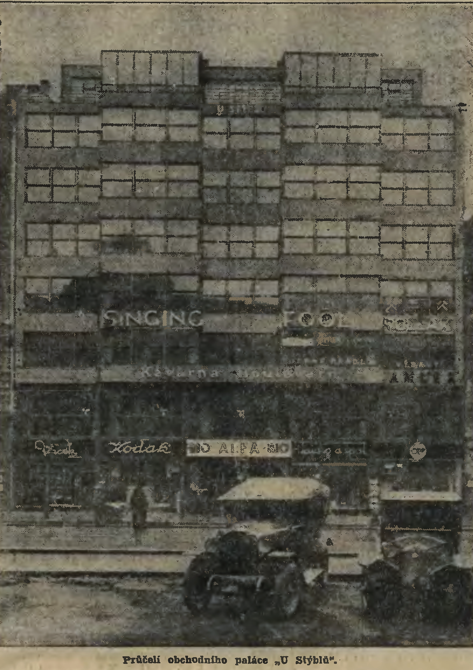 Palác Stýblo (dobová fotografie z tisku)